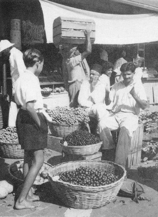 Central Market - vegetables, Port Louis, Mauritius